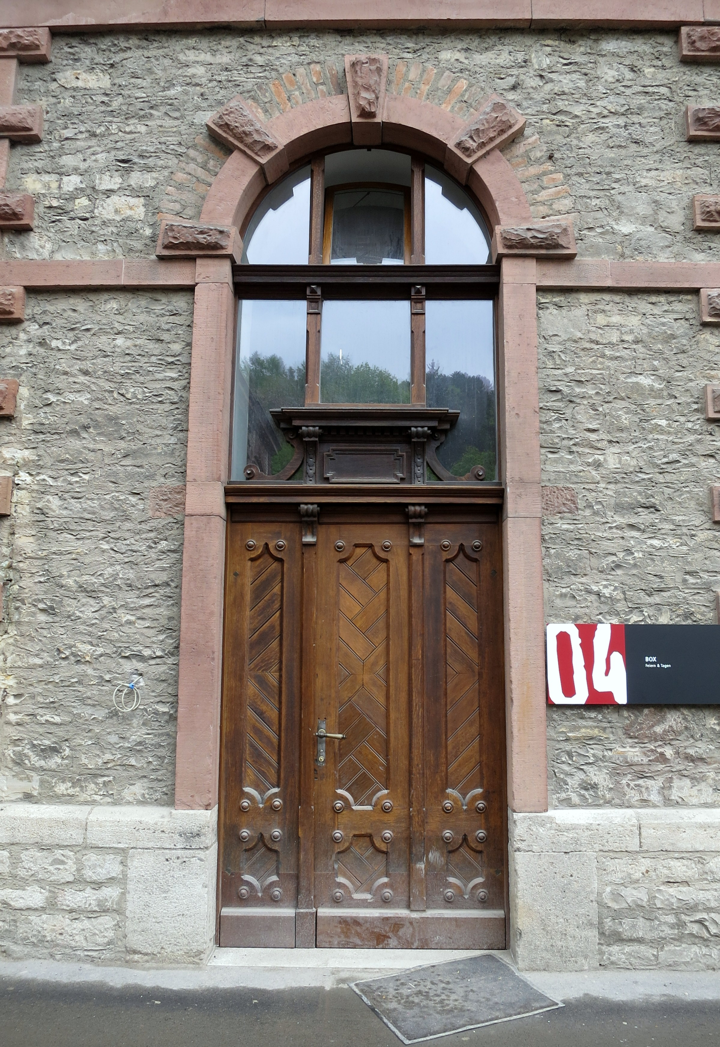 Bürgerbräu Areal, denkmalgeschützter Denkmalkomplex, jetzt Kultur- und Kreativzentrum